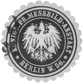 Sealing stamp Title: Königl. Pr. Messbild-Anstalt Berlin Description: schwarz, weiß, geprägt Place: Berlin size: 4 cm